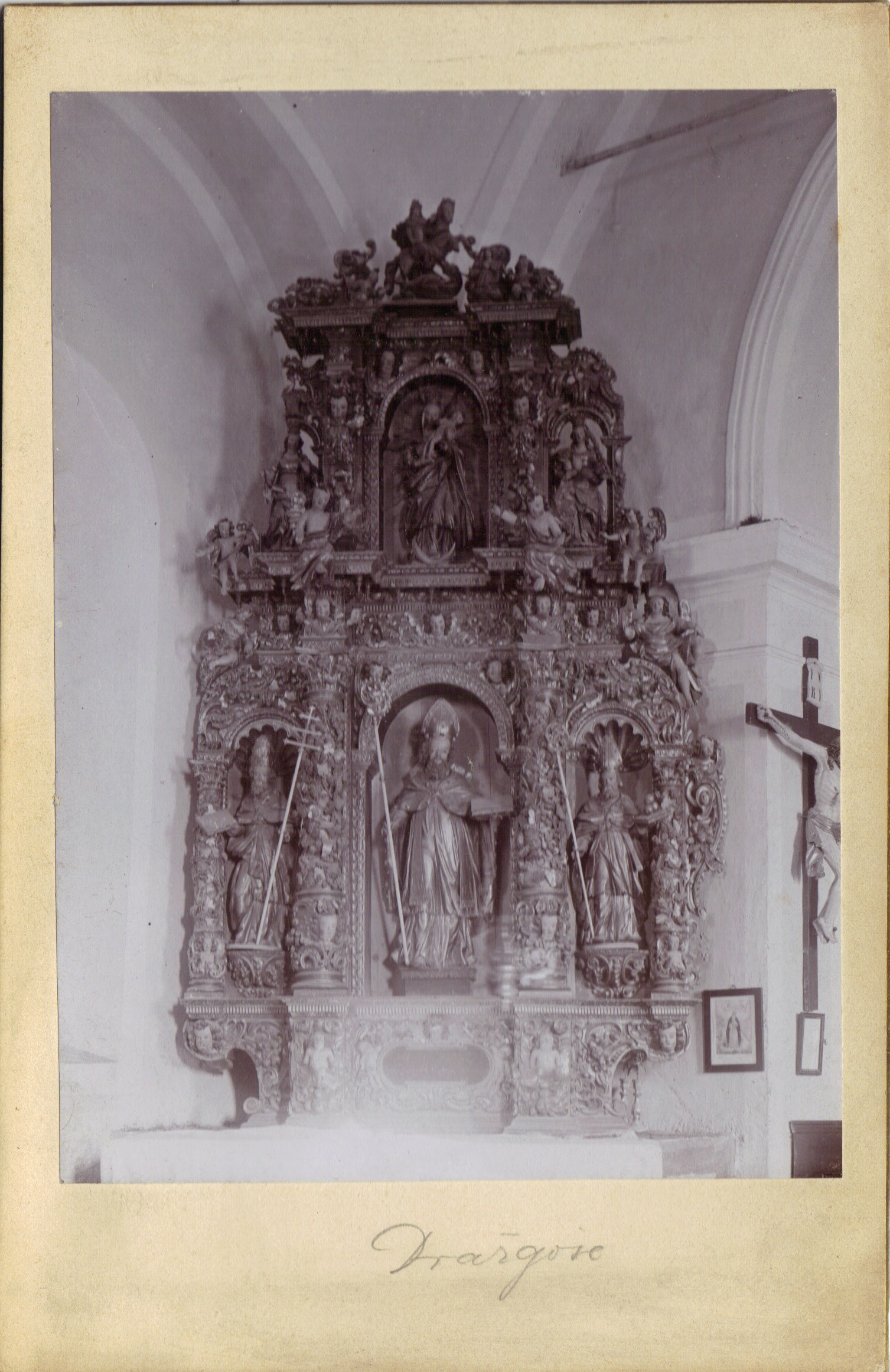 Eden izmed oltarjev v cerkvi sv. Lucije v Dražgošah. Danes shranjen v Loškem muzeju v Škofji Loki. Fotografija posneta okoli l. 1905, fotograf Rovšek (original hrani J. A. Oman).